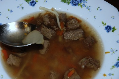 Hovězí vývar, krájené vařené hovězí maso, kořenová zelenina a těstoviny (vlasové nudle).Czech Republic.